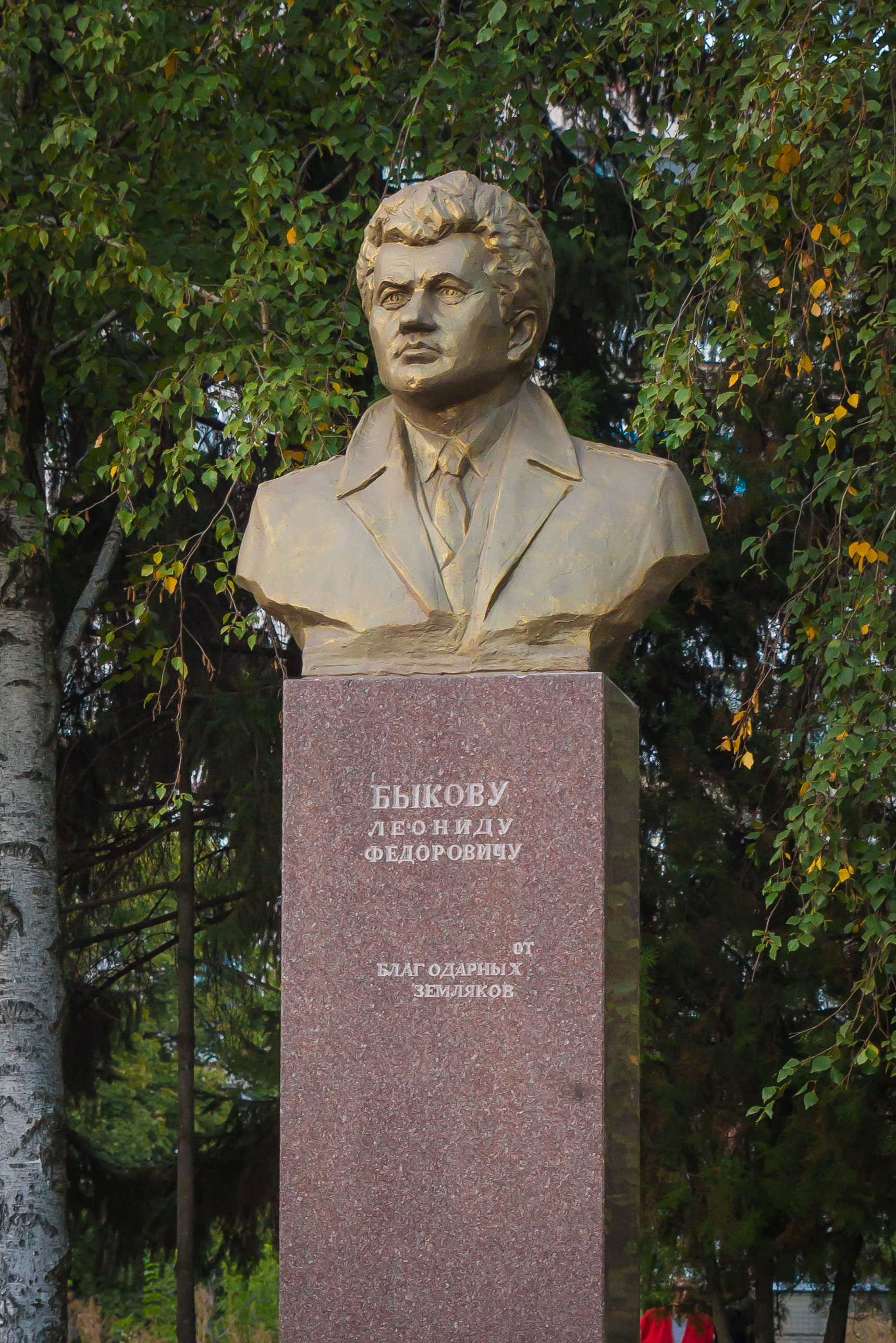 Пам'ятник Бикову Л. Ф. Народному артисту УРСР, актору, режисеру, Краматорськ, вул. Шкільна, біля БК ім Леніна